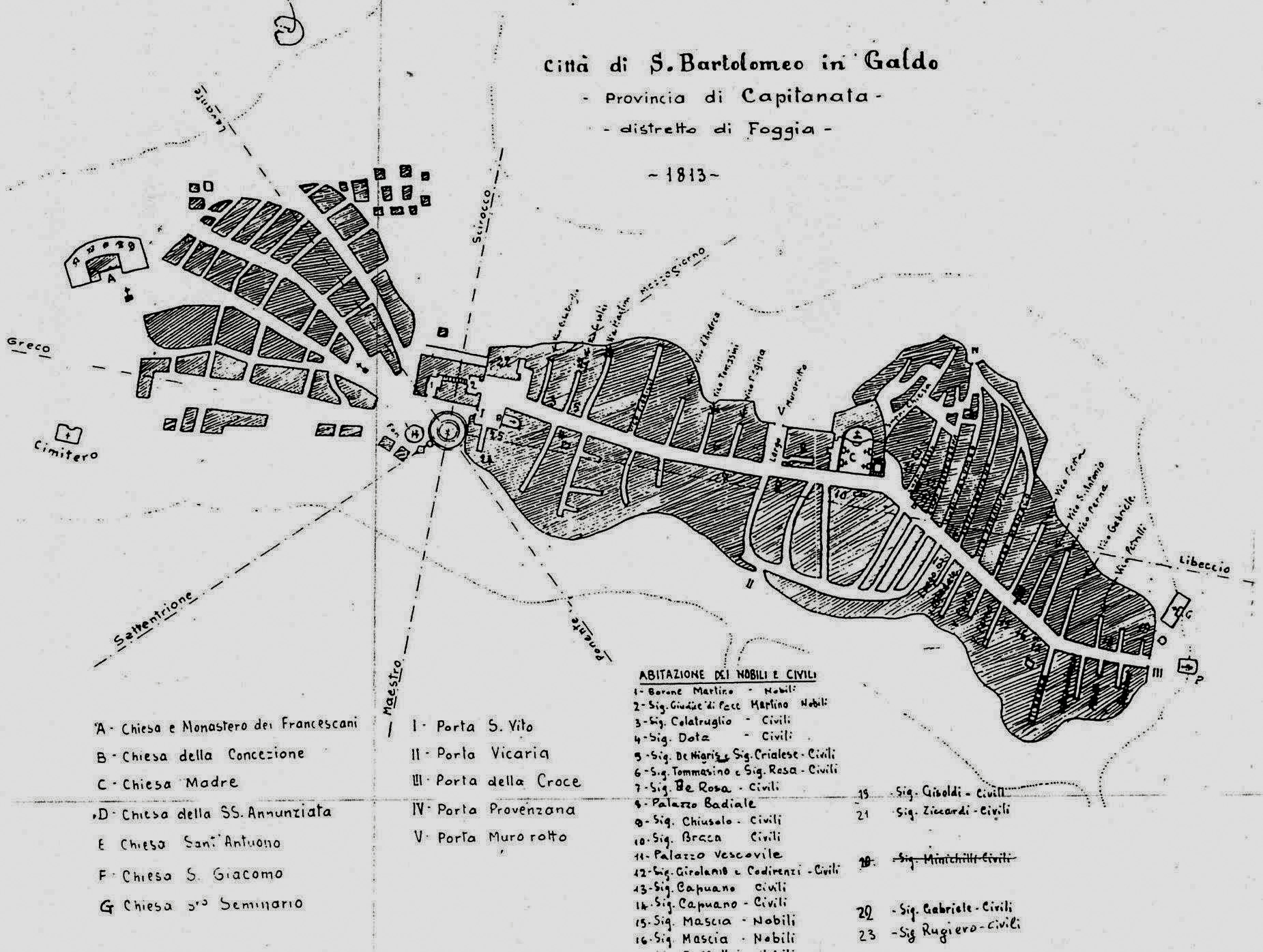 Mappa del 1813, di San Bartolomeo in Galdo, allora provincia di Capitanata del distretto di Foggia